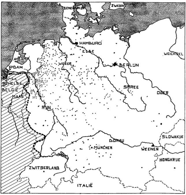 Met punten zijn de plaatsen in Nederland, in Duitsland en elders in Midden-Europa aangegeven waar slachtoffers van de razzia’s van 10 en 11 November 1944 tewerkgesteld werden. Het gebied dat begin November 1944 door de Geallieerde legers bevrijd was, is gearceerd.